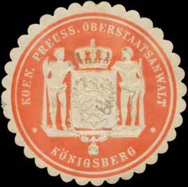 Siegelmarke des Oberstaatsanwalts in Königsberg, Provinz Ostpreußen.